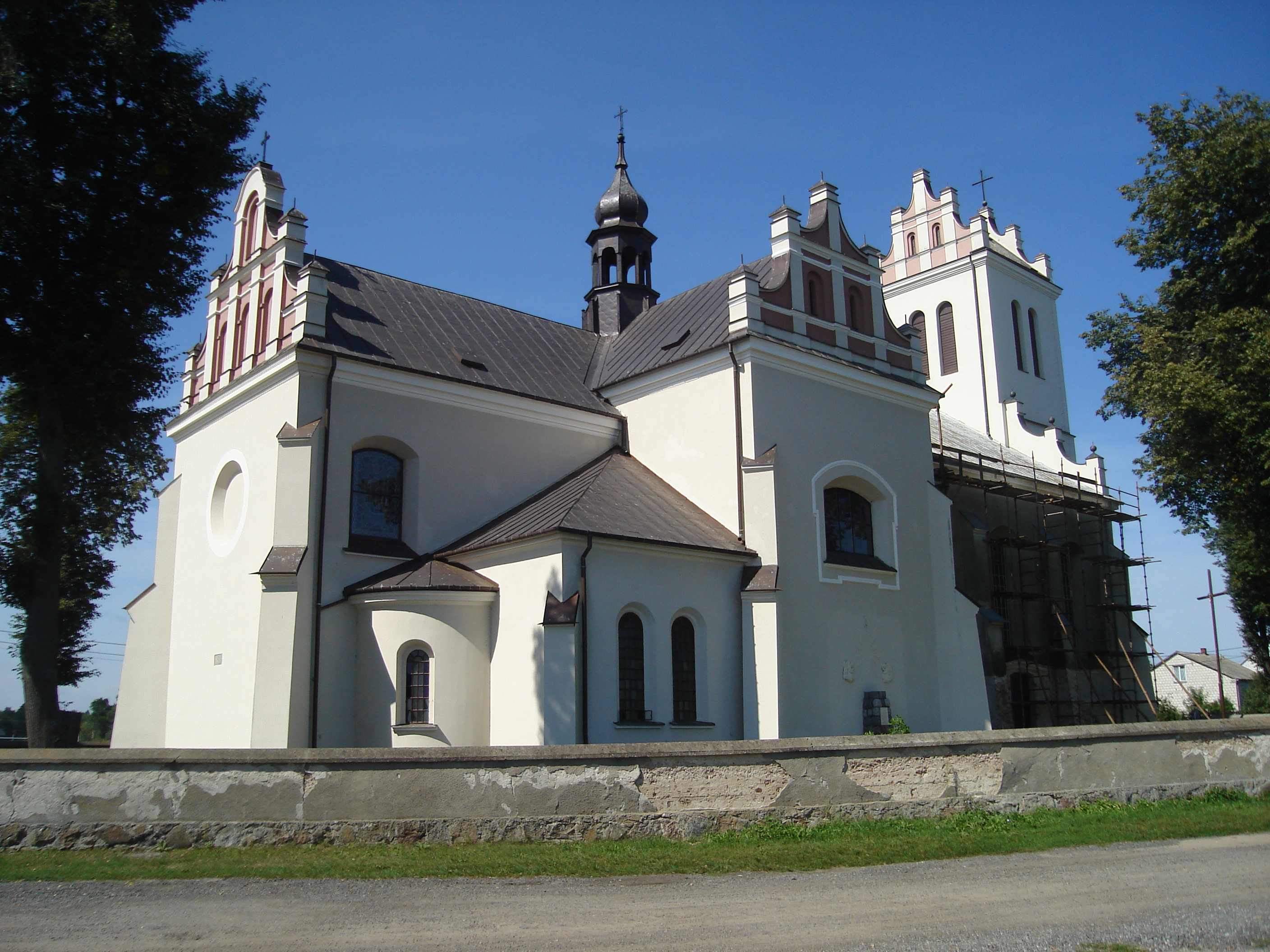 Kościół w Sieluniu. Widok z boku.